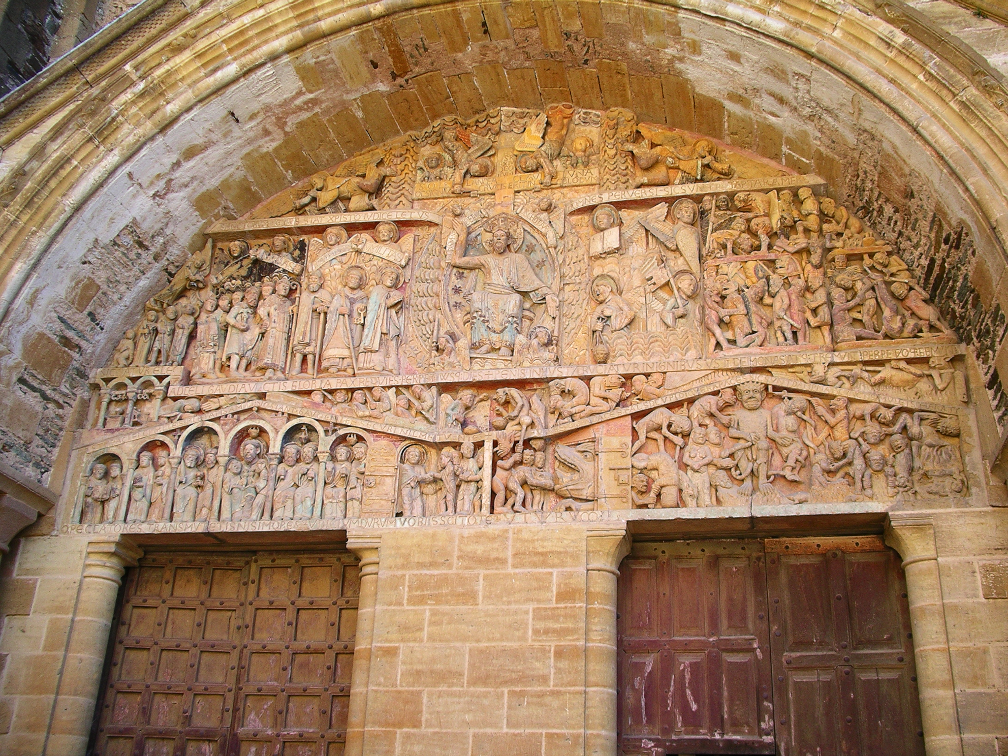 Le tympan de l'abbatiale Sainte-Foy de Conques (Aveyron - France). Il représente le jugement dernier. Auteur: woodstock